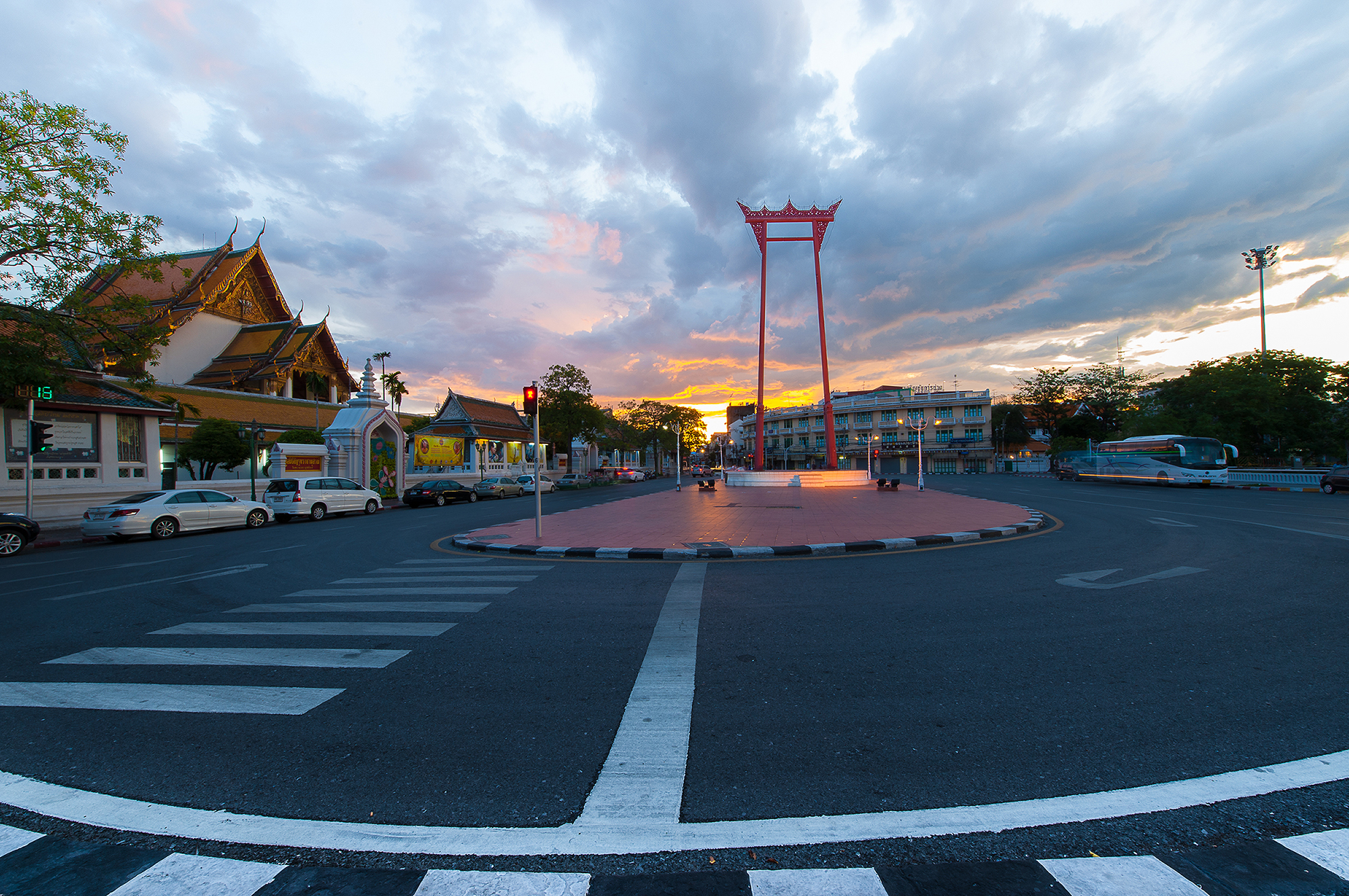 The Giant Swing (Thai: เสาชิงช้า, Sao Ching Cha) is a religious structure in Bangkok, Thailand, Phra Nakhon district, located in front of Wat Suthat temple. It was formerly used an old Brahmin ceremony, and is one of Bangkok’s tourist attractions.